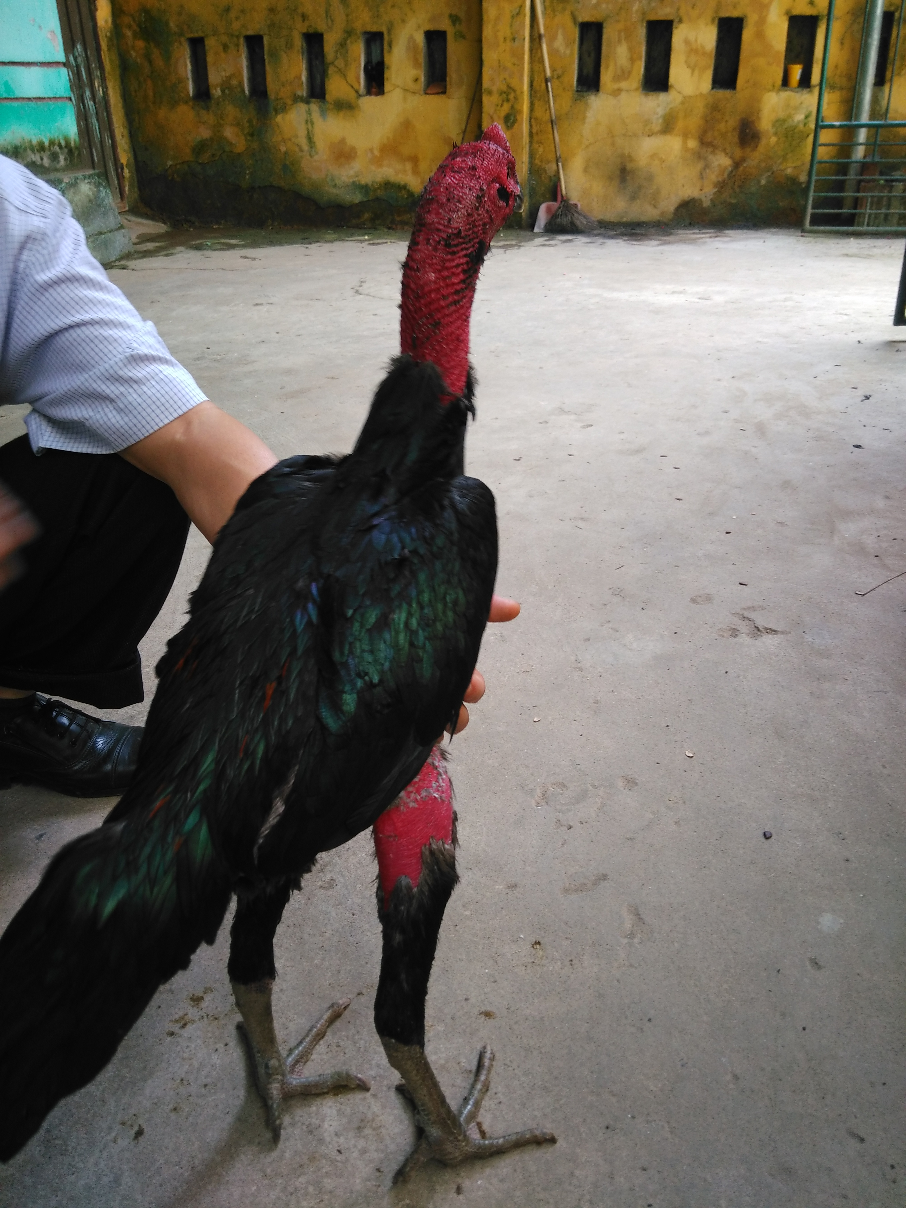 Gà nòi